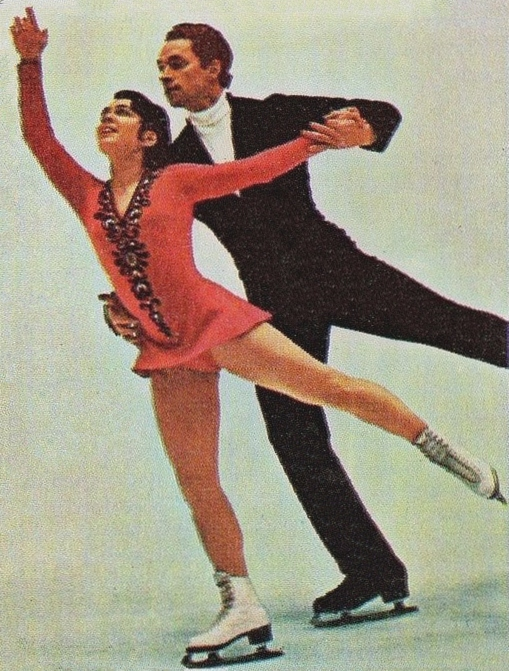 CAMPIONI dello SPORT 1973/74-Figurina n.194- RODNINA+OULANOV -PATTINAGGIO -Rec